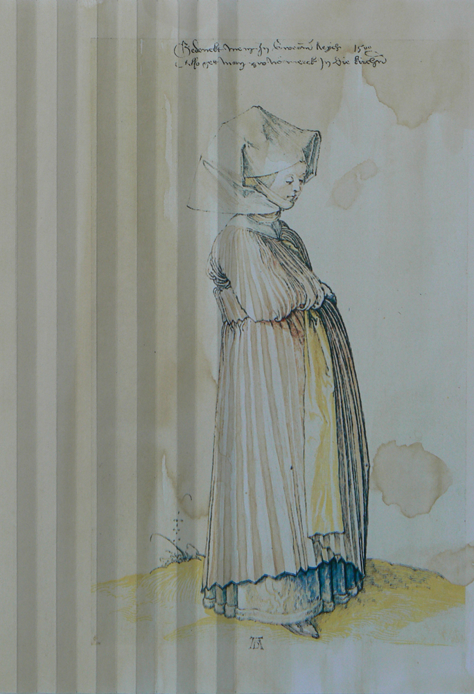 Martin Velíšek, Falten, 2014, kombinovaná technika, 26 x 18 cm